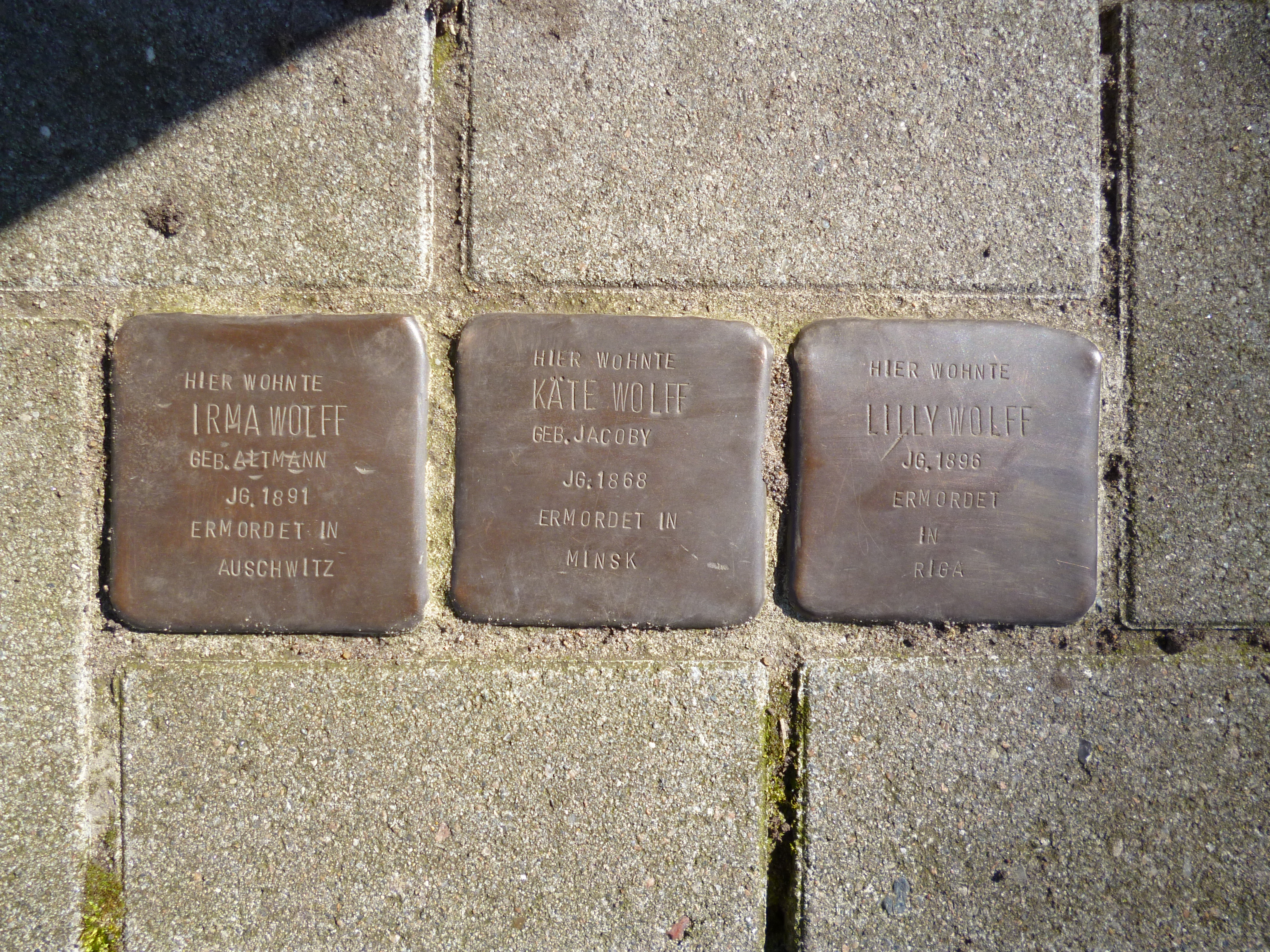 Stolpersteine von Irma Wolff, Käte Wolff und Lilly Wolf, verlegt in Flensburg